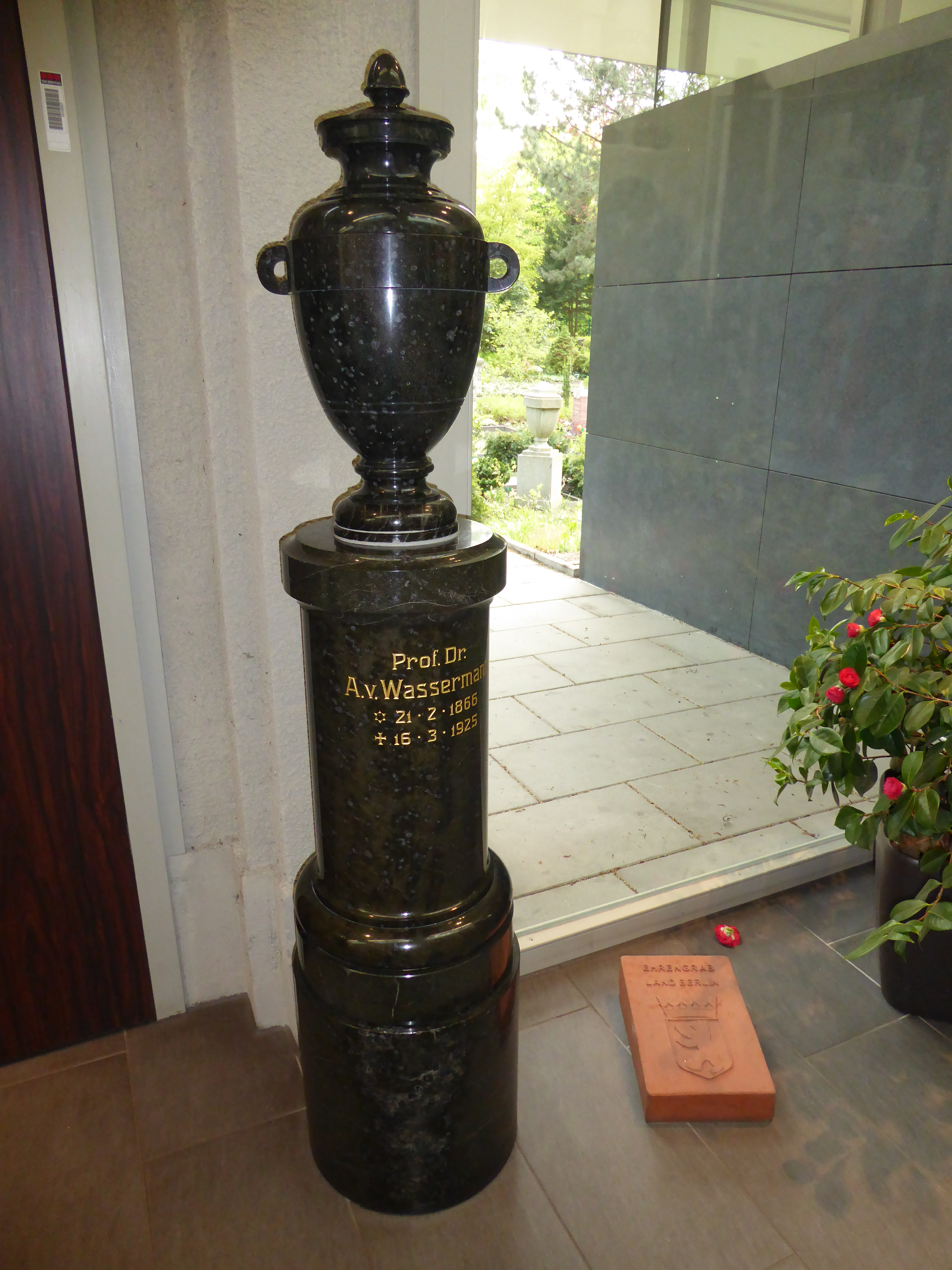 Wedding Gerichtstraße Urnenfriedhof Columbarium Urne August von Wassermann